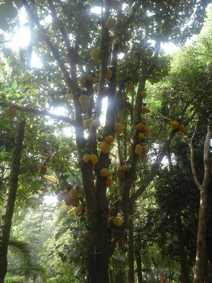 ಕನ್ನಡ: ಹಲಸಿನ ಹಣ್ನು